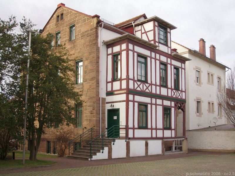 Denkmalgeschütztes Wohnhaus in der Uhlandstr. 57 in Heilbronn, Rückansicht